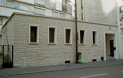 Трёхсвятительское подворье в Париже.